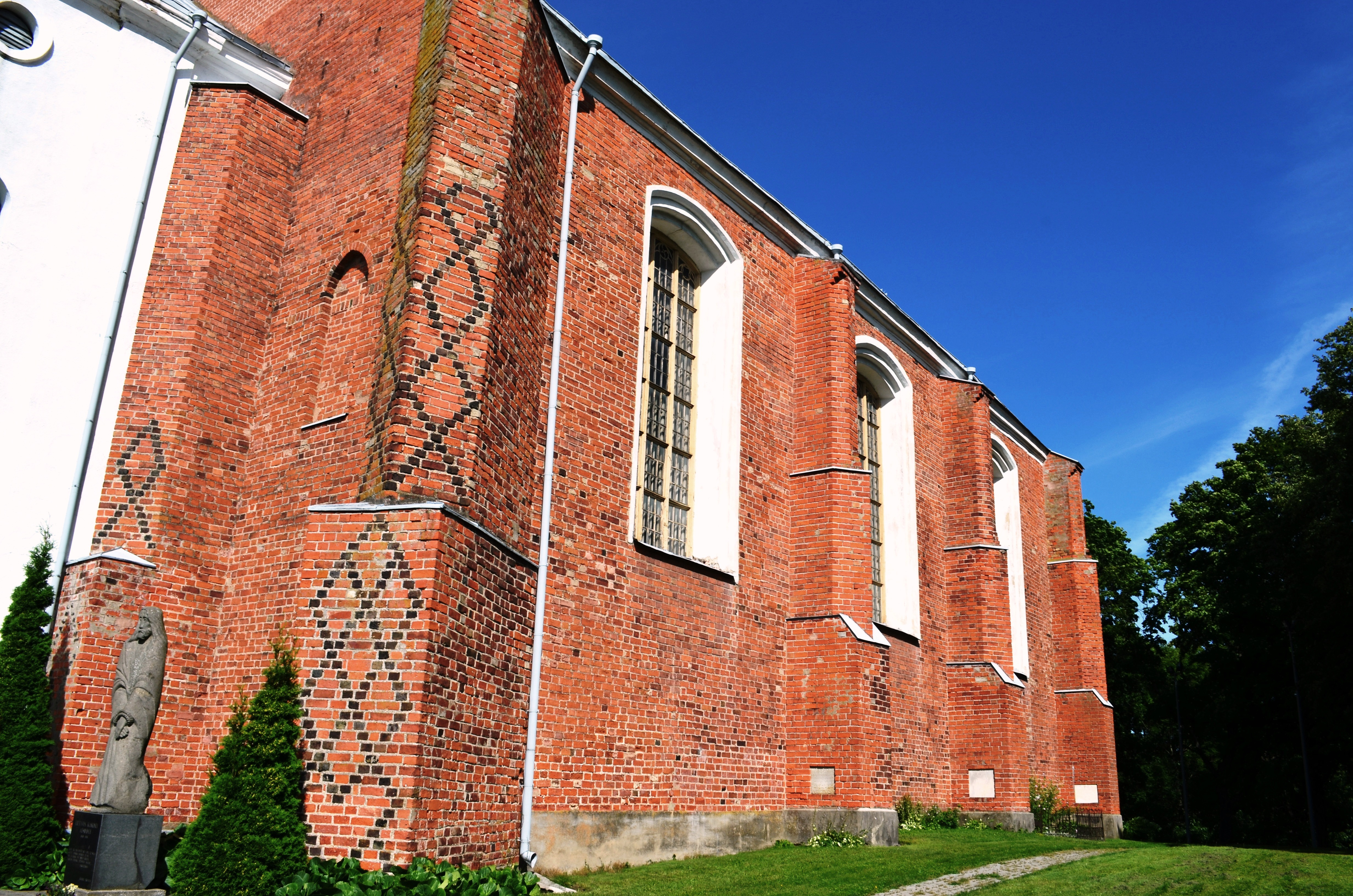 Kėdainių Šv. Jurgio bažnyčios fragmentas